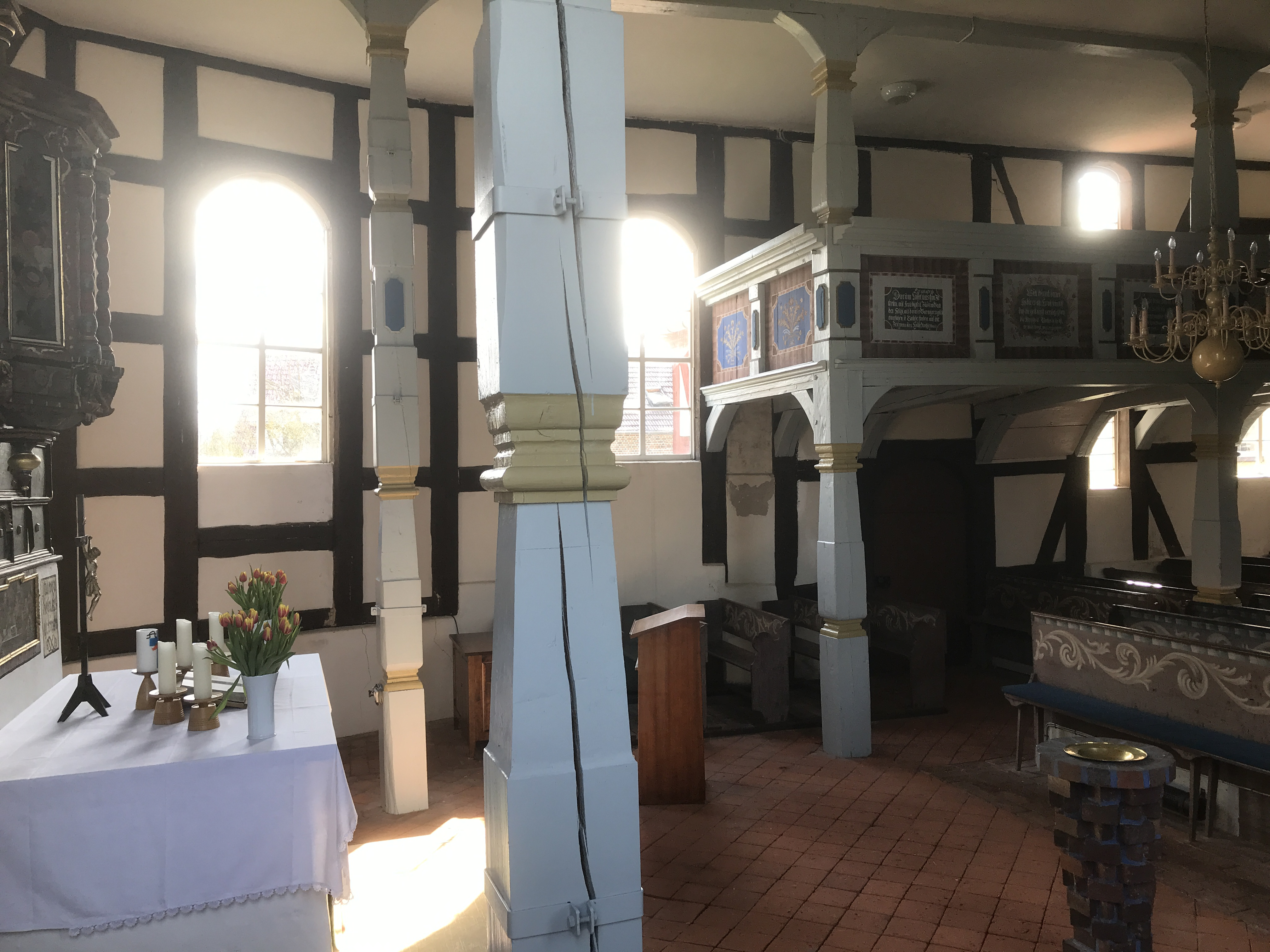 Die Dorfkirche Niewitz der Gemeinde Besteland im Landkreis Dahme-Spreewald in Brandenburg ist ein Fachwerkbau aus der Zeit um 1770.